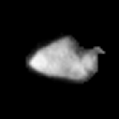 Asteroid 5535 Annefrank